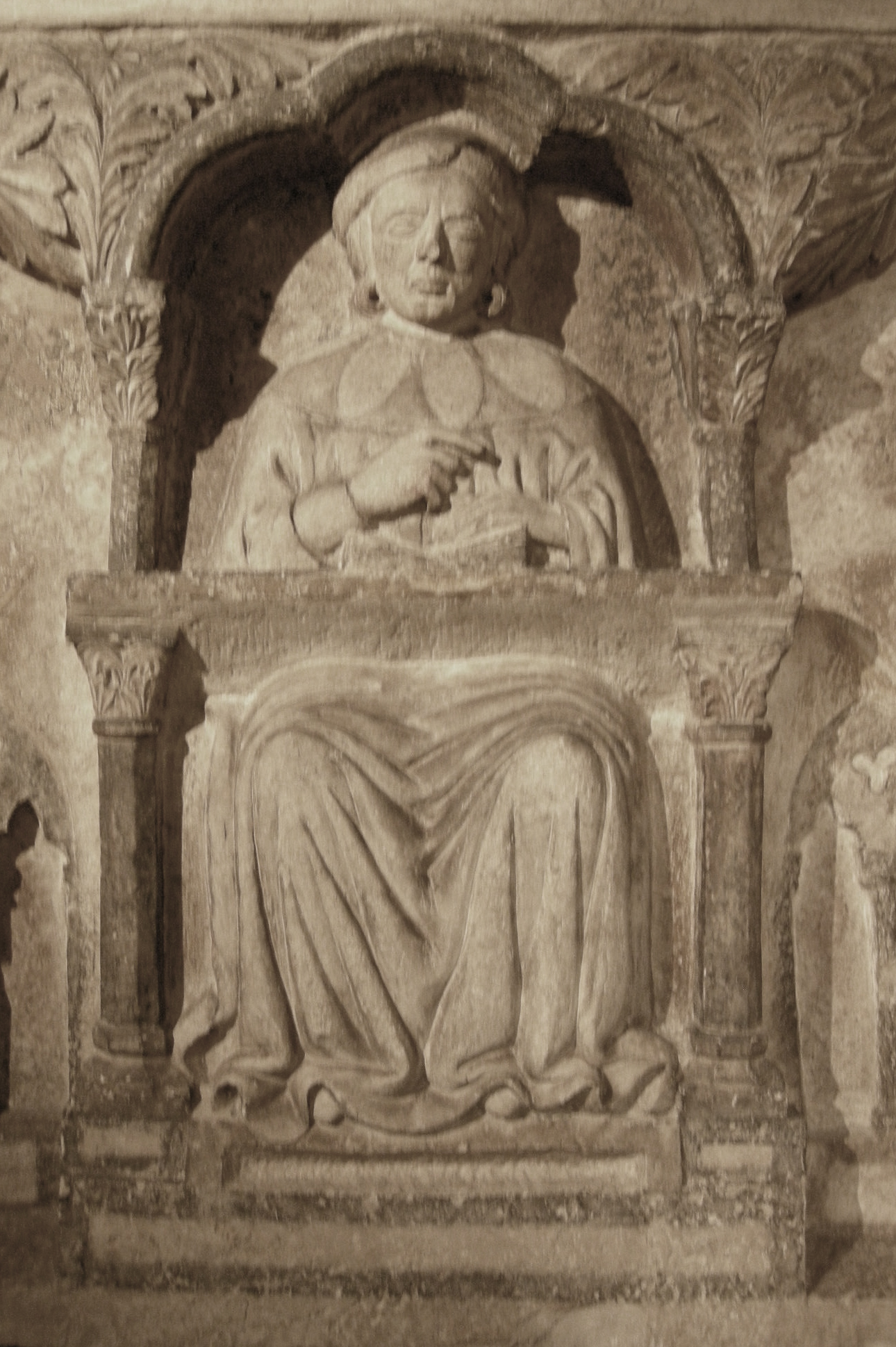 Bettino da Bologna, Sepolcro di Bonifacio Galluzzi (+ 1346), dal chiostro di San Domenico a Bologna, oggi esposto nel Museo civico medievale a Bologna. Numero d'inventario: 1663.